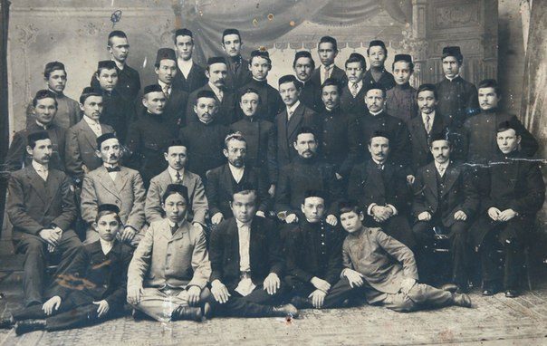 Шакирды медресе Галия (г. Уфа) Башҡортса: Ғәлиә мәҙрәсәһе шәкерттәре (Өфө ҡ.)